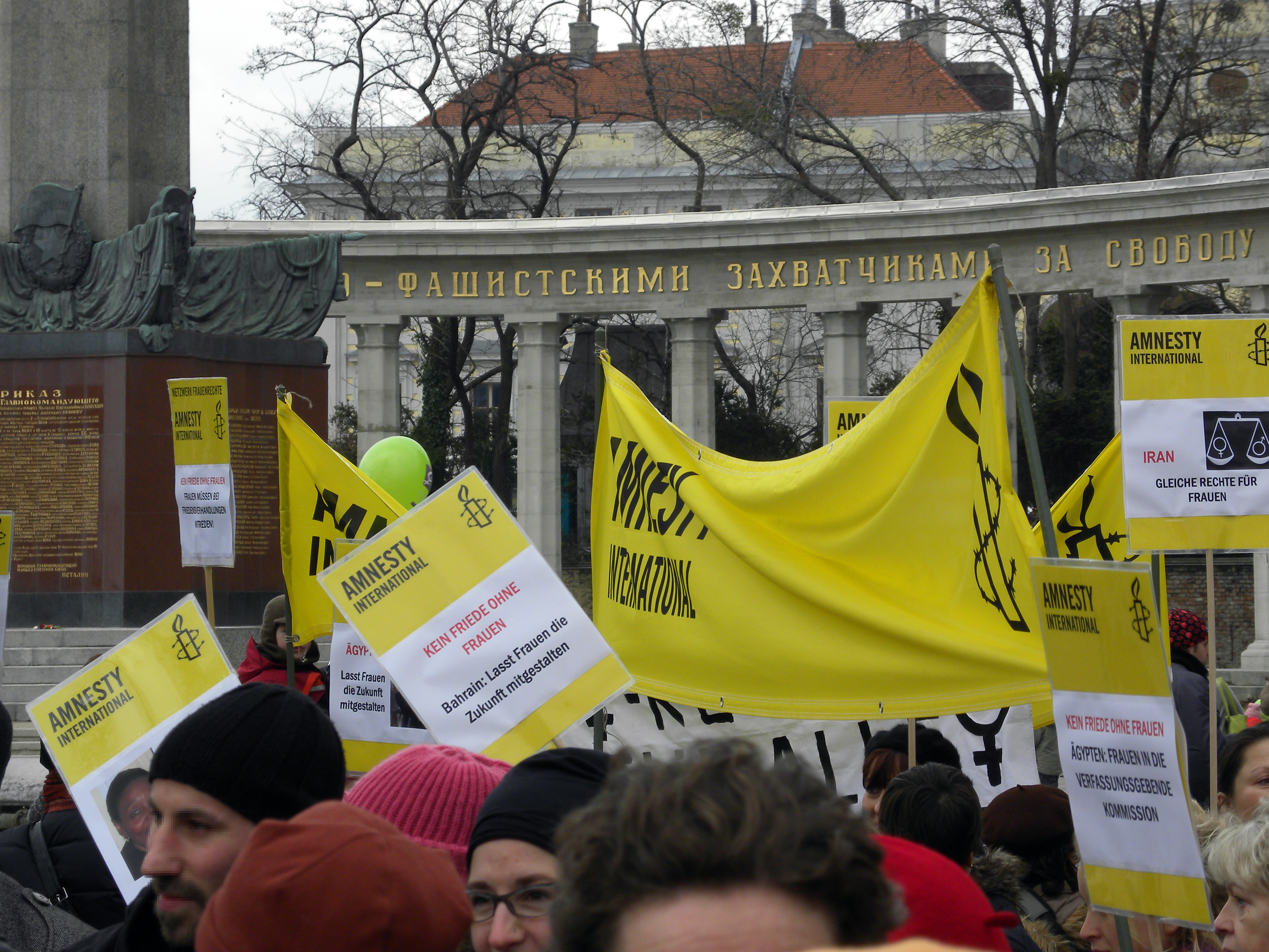 Der 100. Internationale Frauentag wurde in Wien mit einem Aktionstag, zu dem u.a. die Kunstaktion KnitHerStory und eine Demonstration mit Kundgebung gehörte, gefeiert.